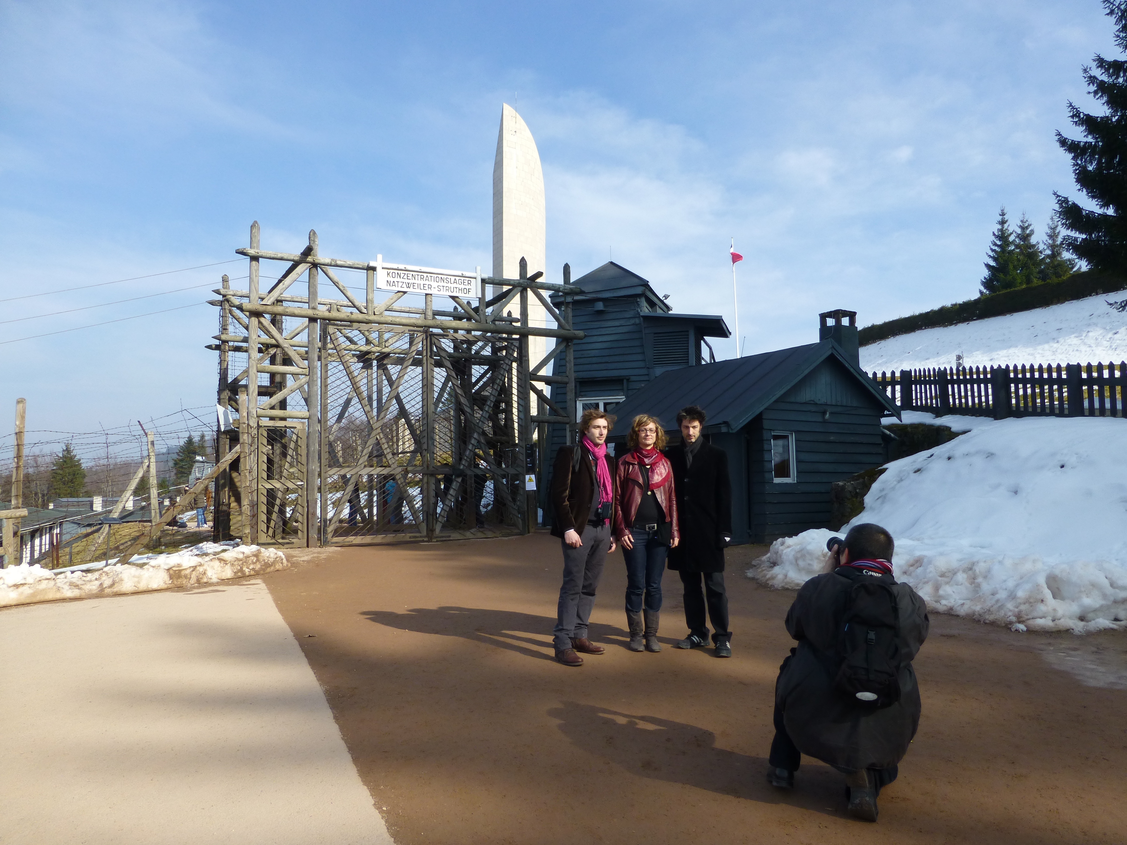 Axel Ramonet, Sonia Rolley et Tancrède Ramonet, réalisateurs du film documentaire Au nom de la race et de la science. Strasbourg 1941-1944, dans l'objectif d'un photographe de Wikimedia France, à l'entrée du camp du Struthof